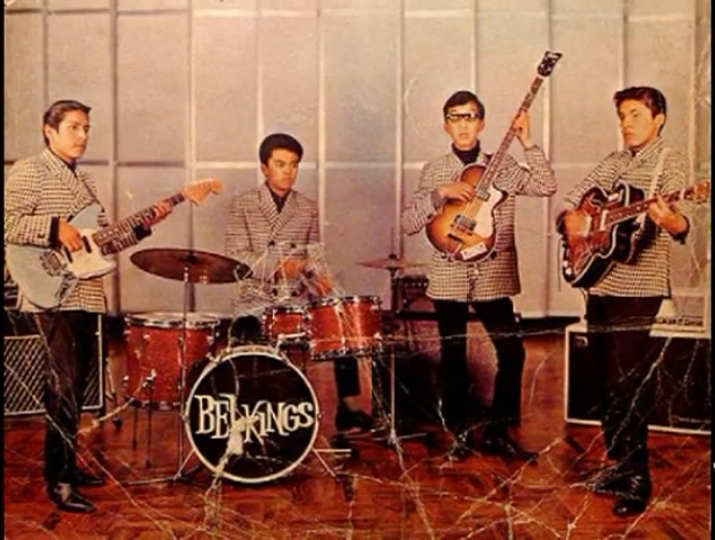 Banda de rock surf instrumental Los Belking's.